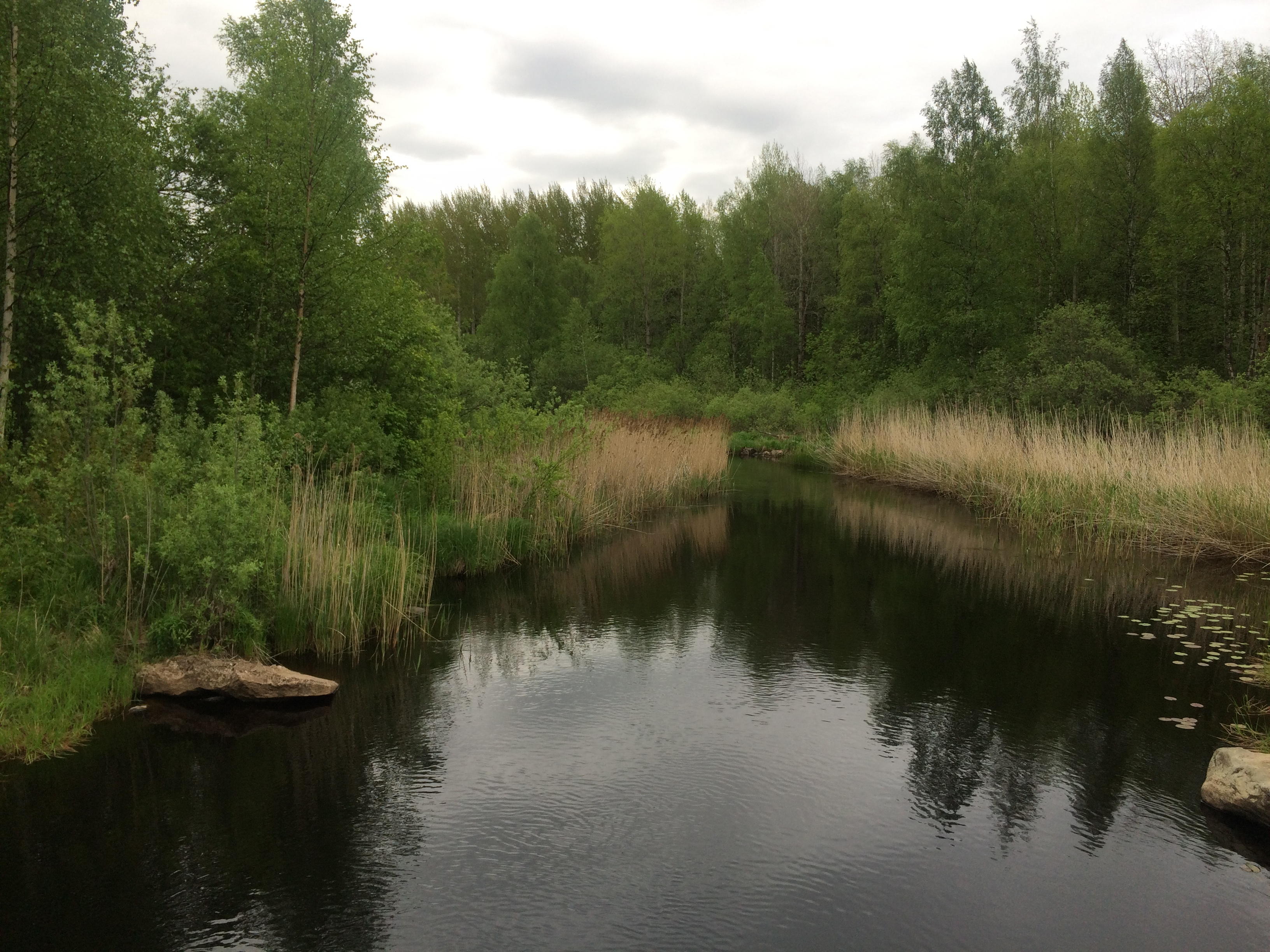 река Задняя (Карелия)